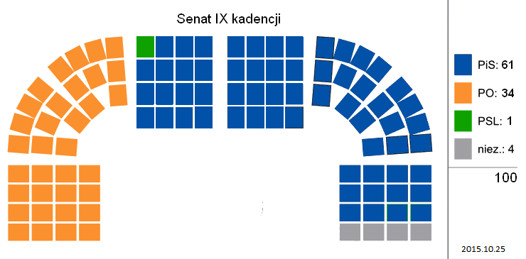 Senat IX kadencji. Rozkład mandatów. Wyniki wyborów 2015-10-25. Źródło: Wykorzystane grafiki (Creative Commons): Senat_VIII_wyniki_wyborów.svg, Senat.svg